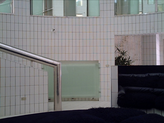 Casa museo Remo Brindisi This is a photo of a monument which is part of cultural heritage of Italy.